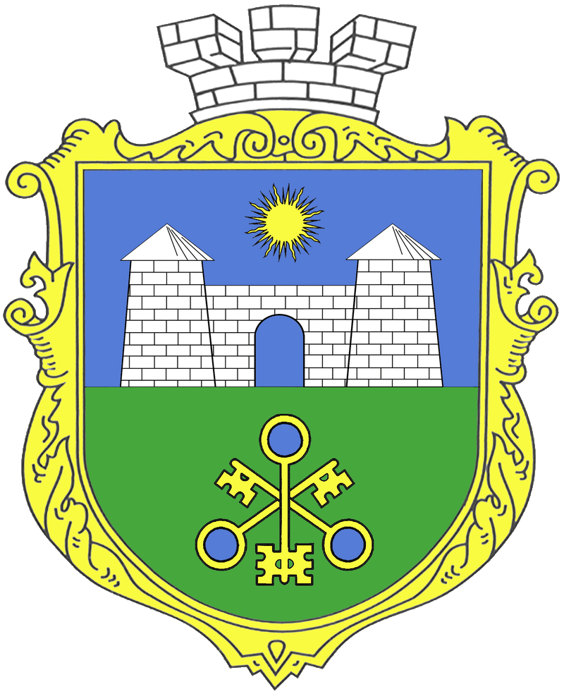 Герб міста Татарбунари